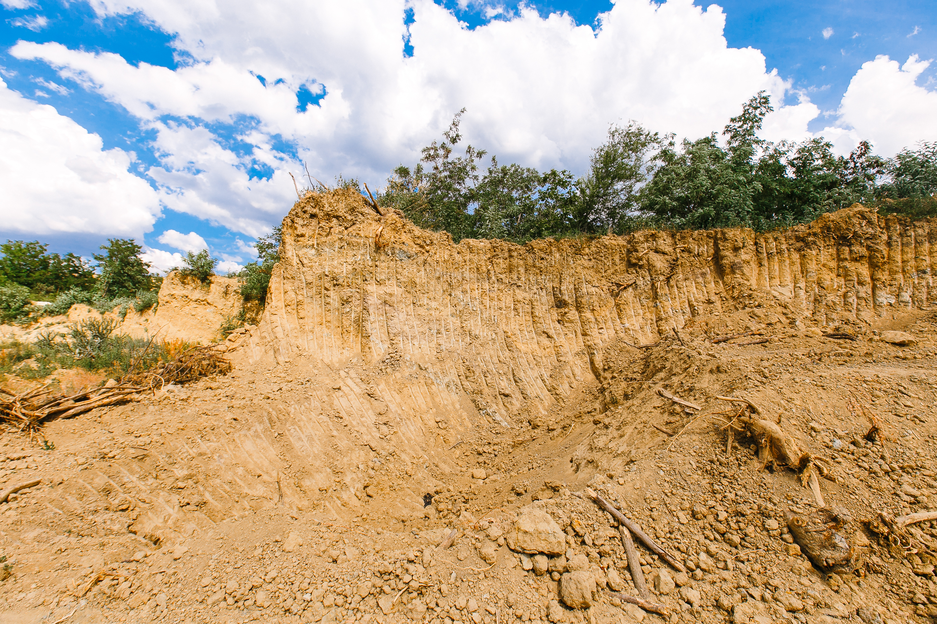 Cariera „Cazacu”, monument al naturii amplasat în raionul Strășeni, la nord de stația de cale ferată Vatra (cod MD-ST-mn.A-071) A-071